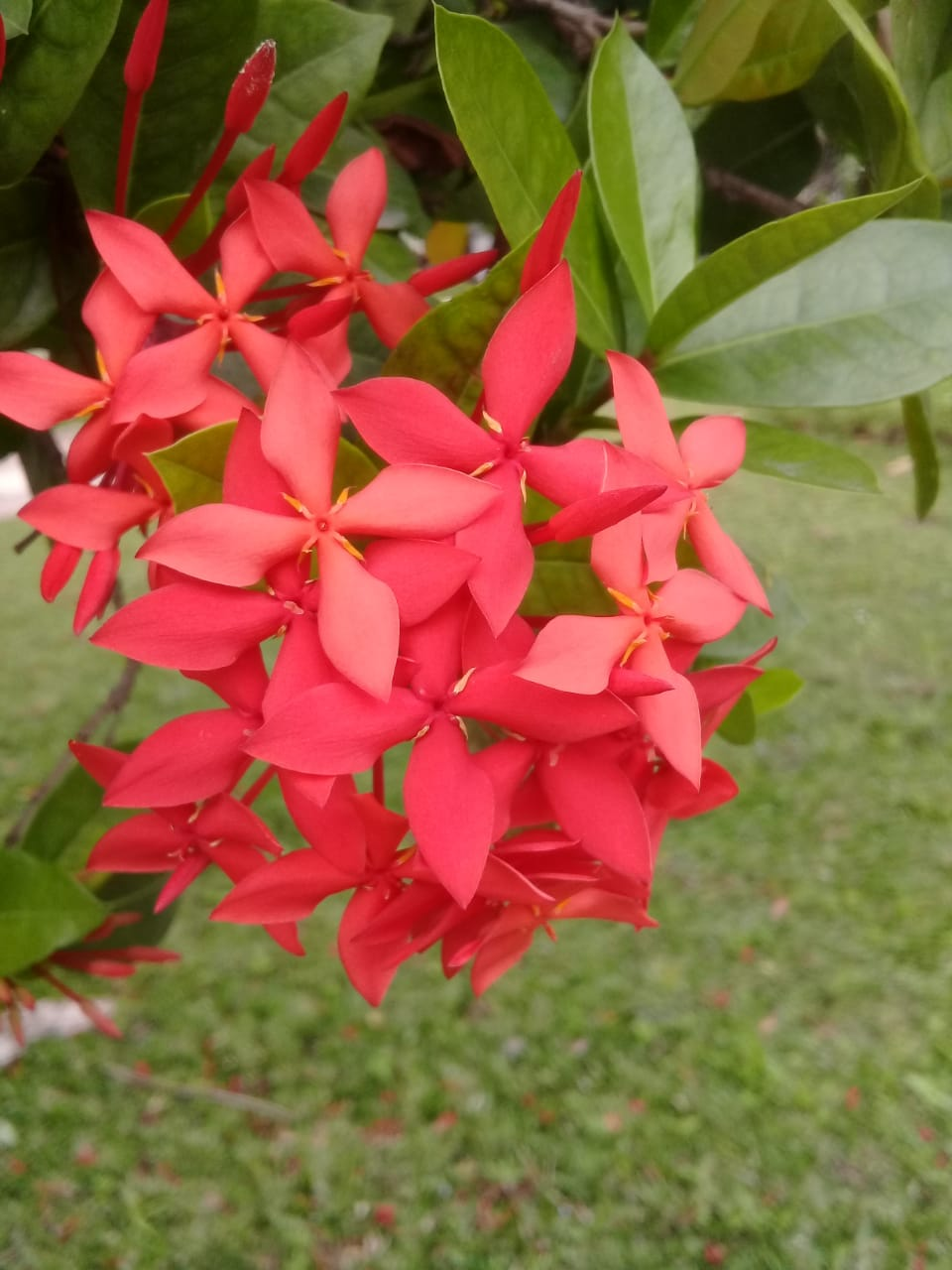 Basa Jawa: Kembang iku warnané abang lan ana ing Keraton Mangkunegara Surakarta. Kembang kasebut katon apik lan endah disawang.